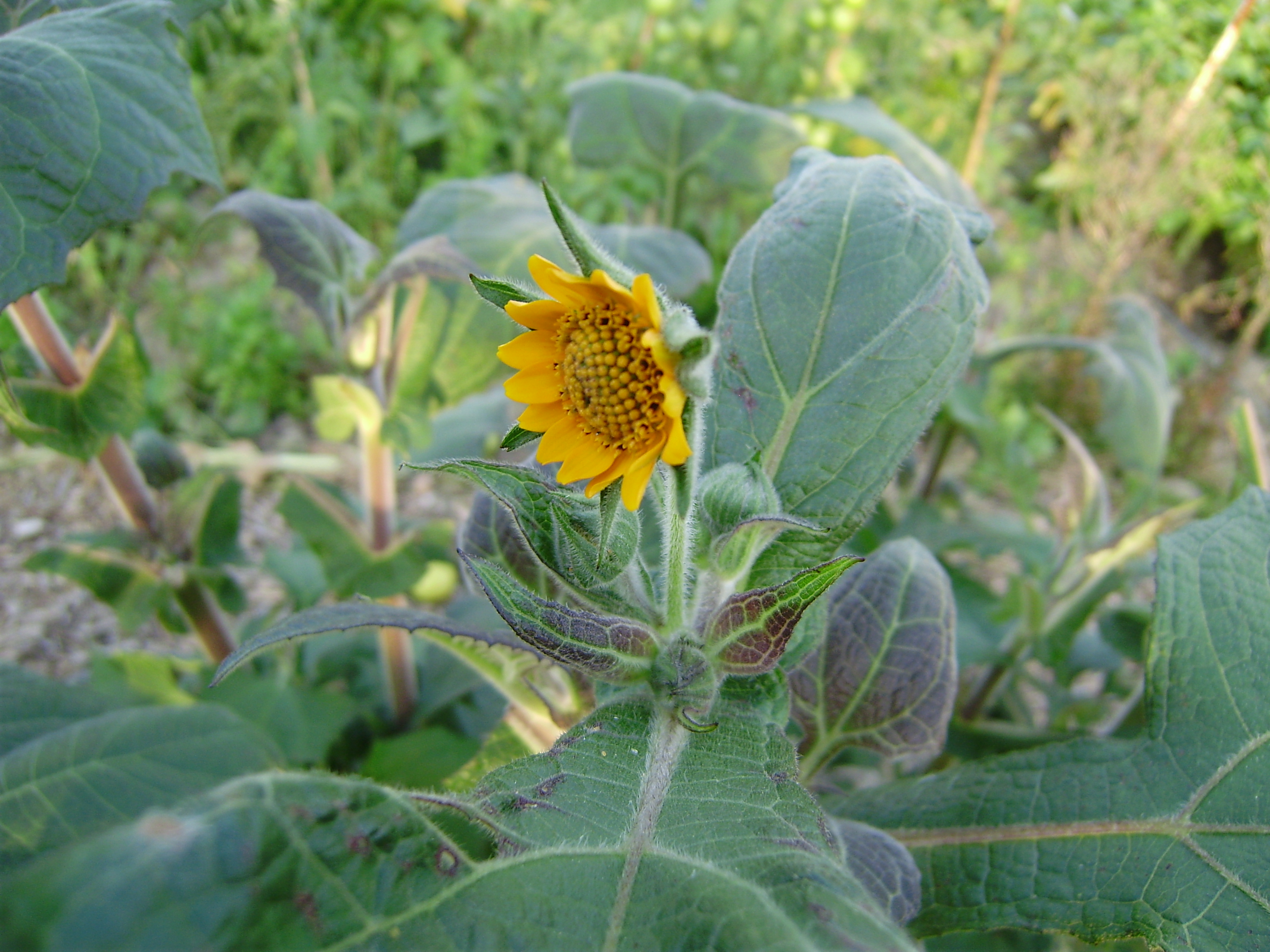 Smallanthus sonchifolius yacon